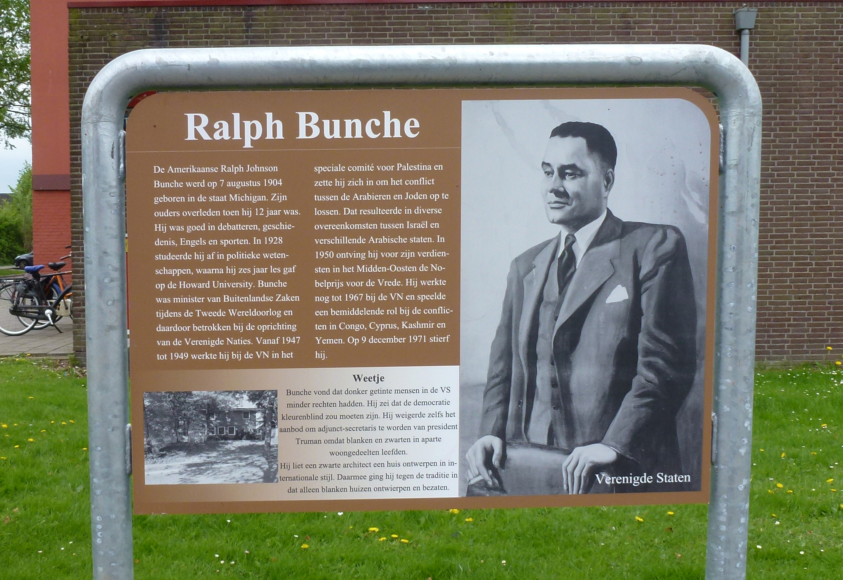 Ralph Bunche, Nobelprijs voor de vrede. Het informatiebord is geplaatst (april 2018) in de naar hem genoemde straat in de buurt Oosterwei in Gouda